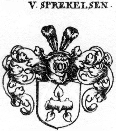 Blason de la famille von Spreckelsen